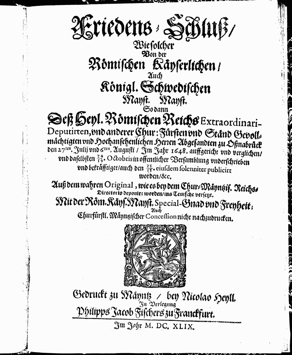 Scans des Drucks des Westfälischen Friedens, Vertrag von Osnabrück